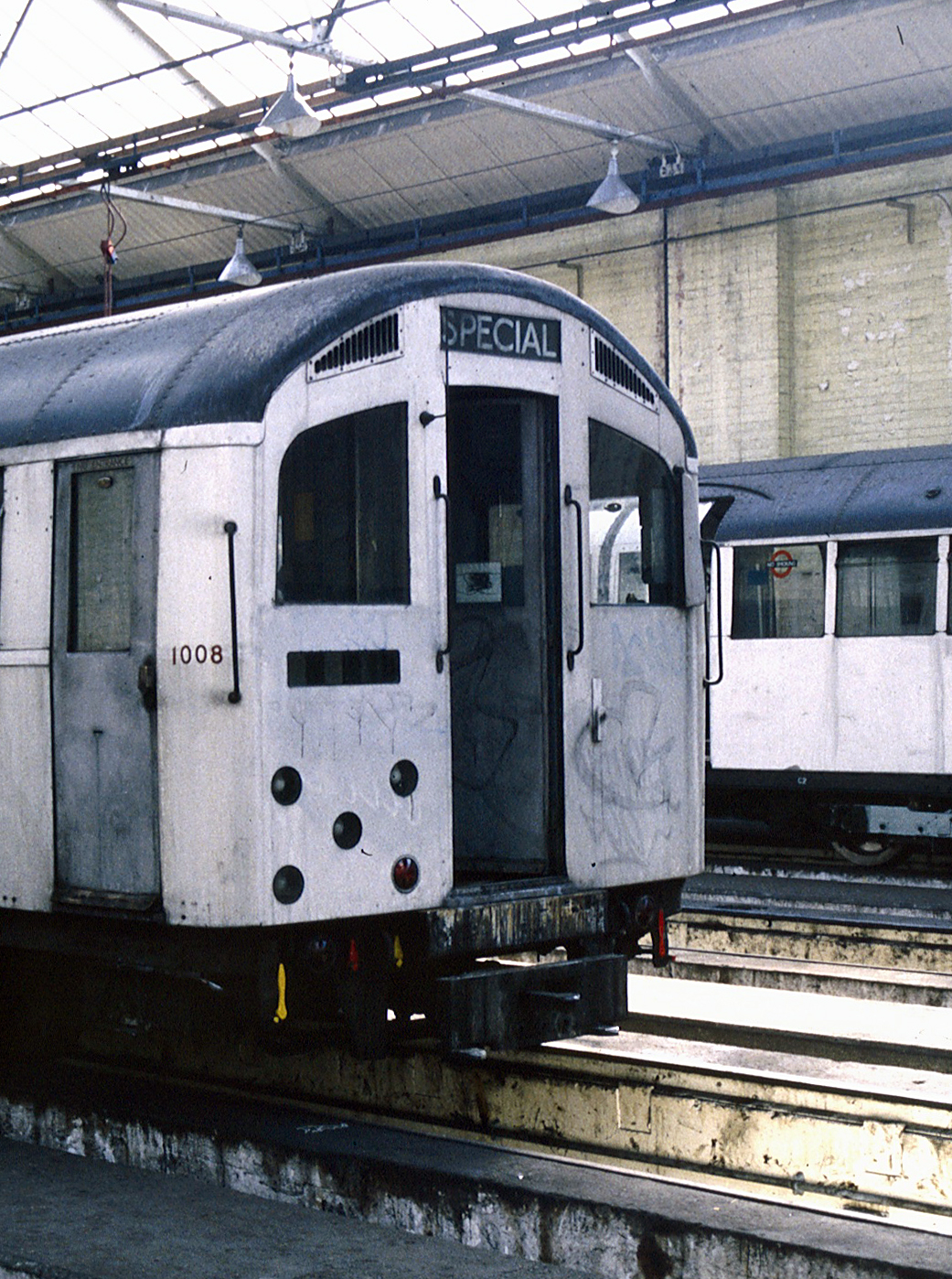 April 1988 1956 Stock